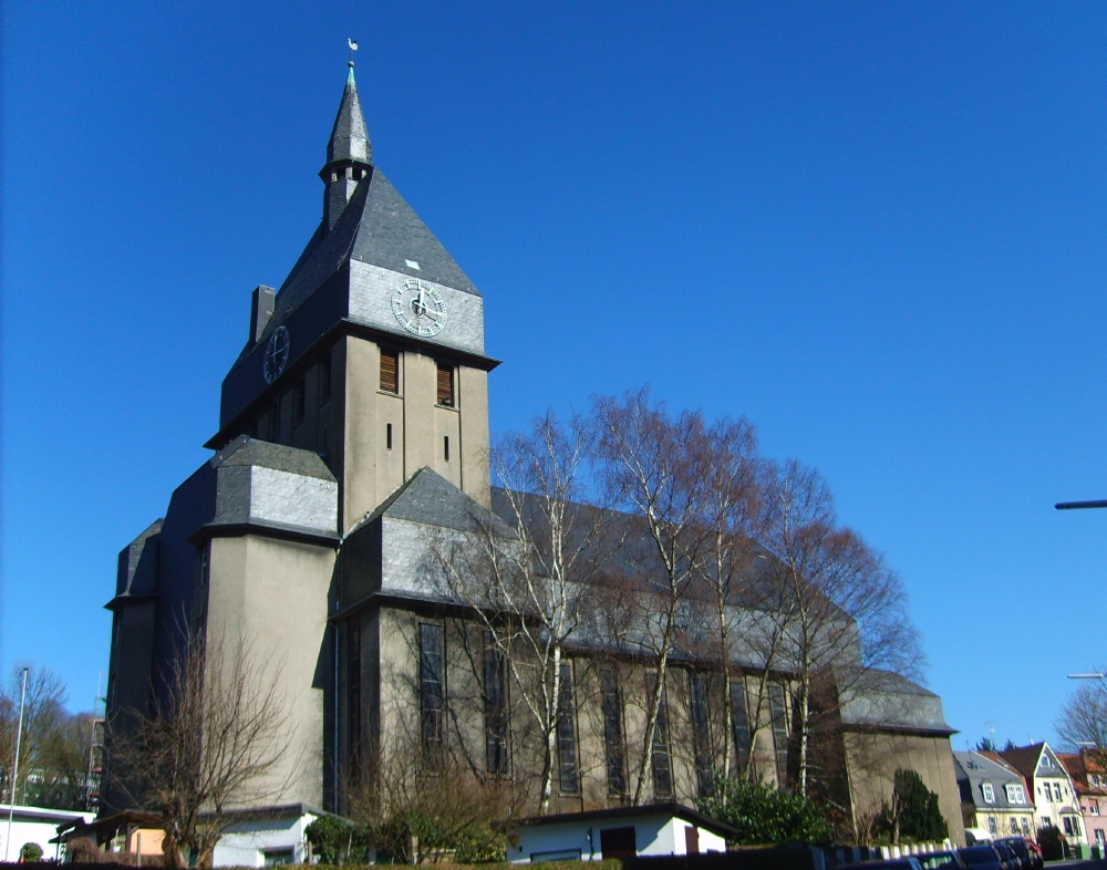 Wuppertal Erlöserkirche